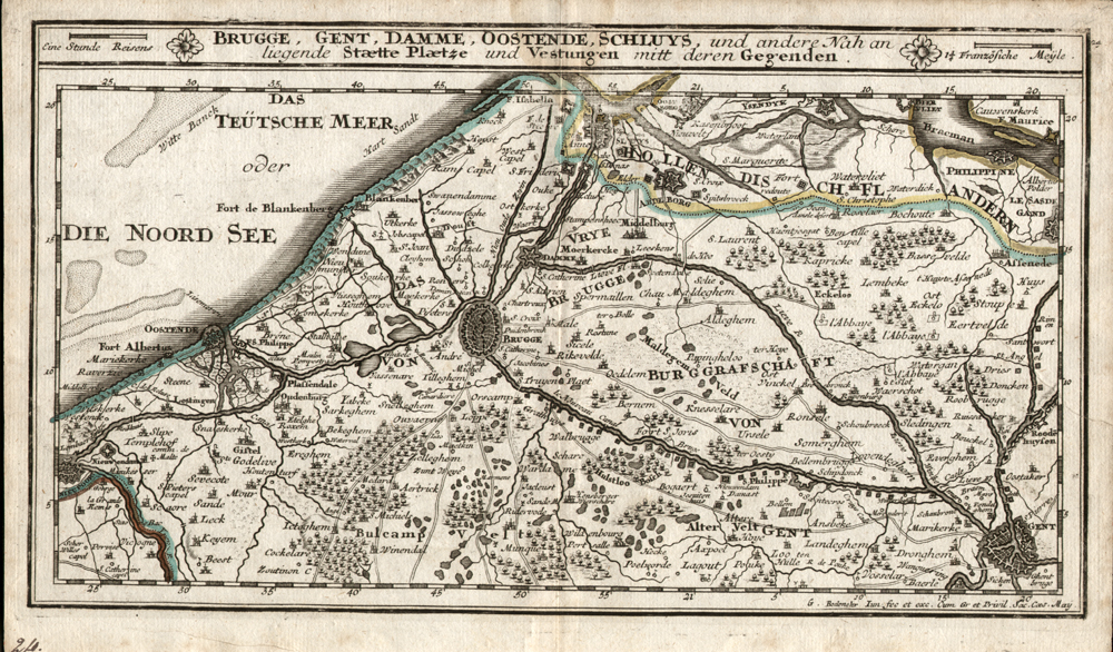 Kanalen tussen Gent en Brugge